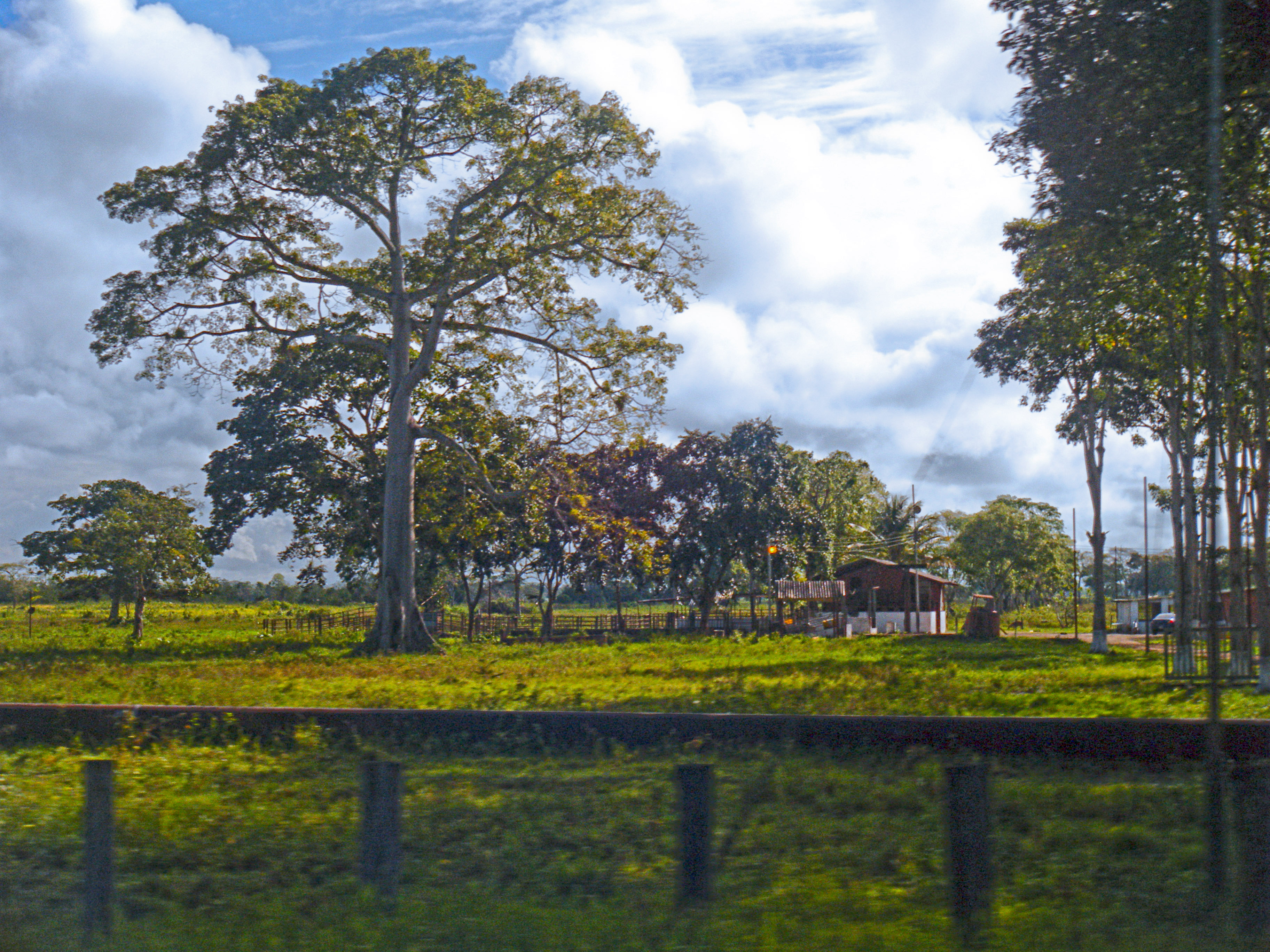 Vía al sur de Maturín, cerca de Veladero, Monagas, Venezuela.